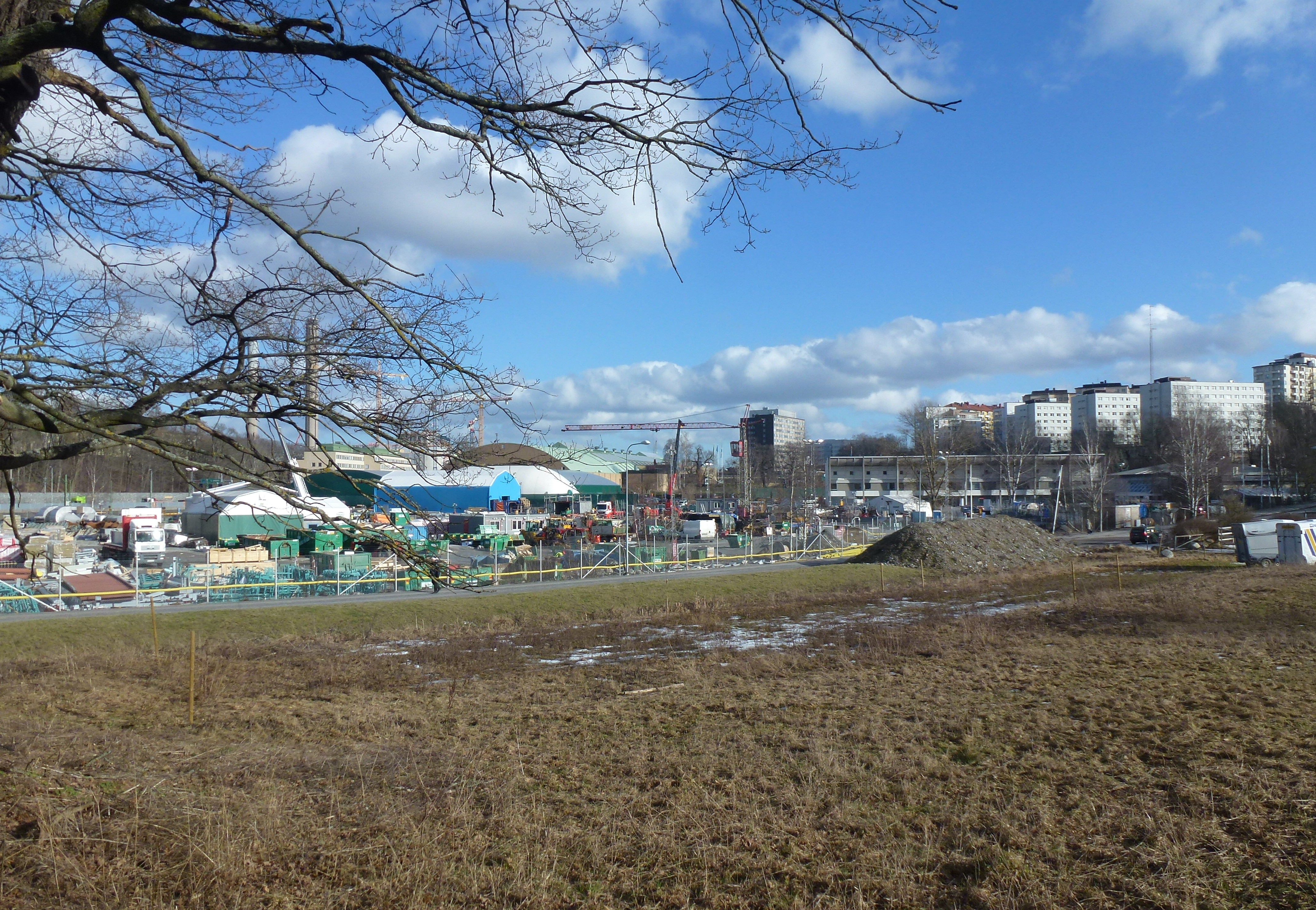 Storängsbotten med platsen för den tidigare Sankt Eriks-Mässan